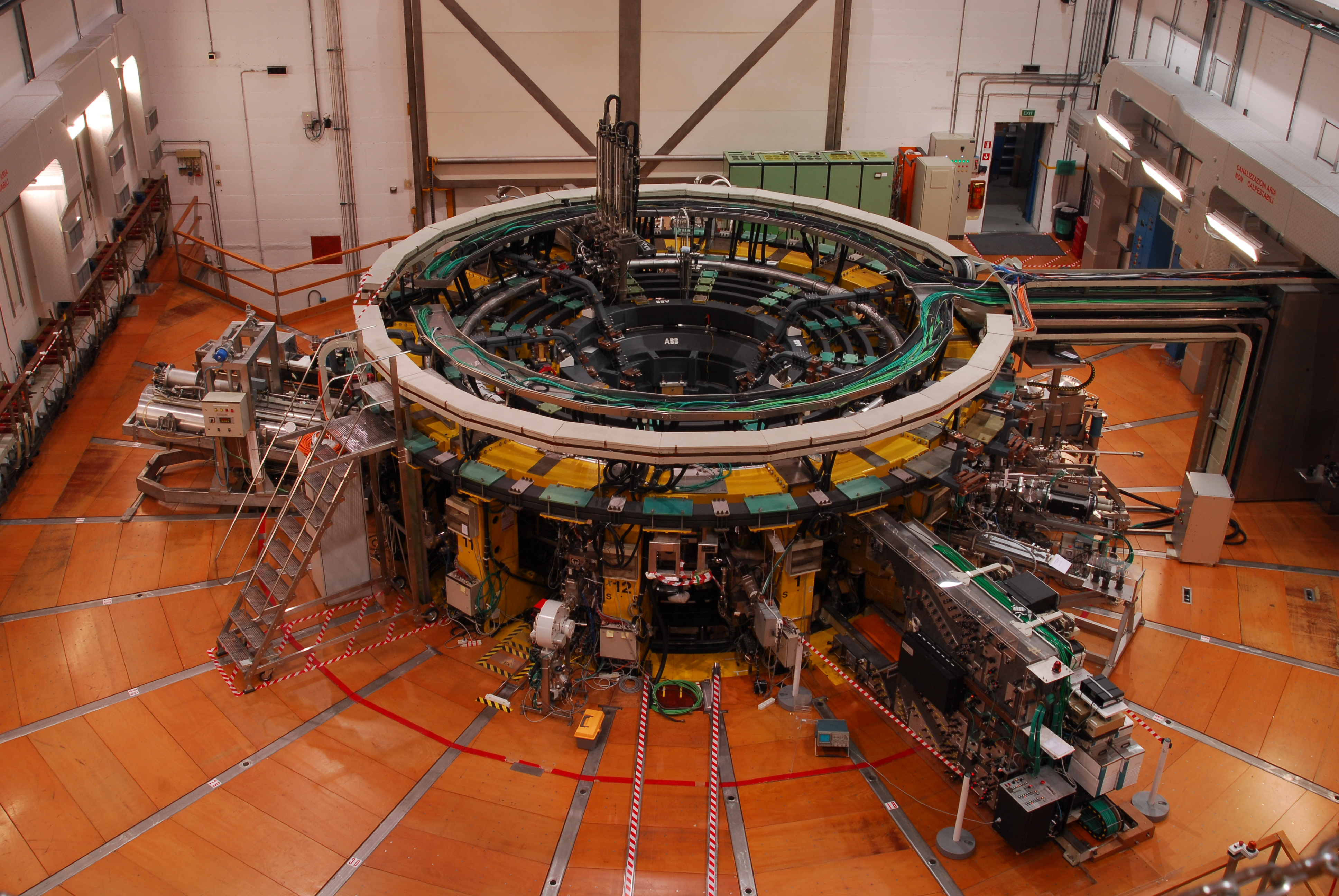 Foto dell'esperimento RFX-mod del CNR di Padova